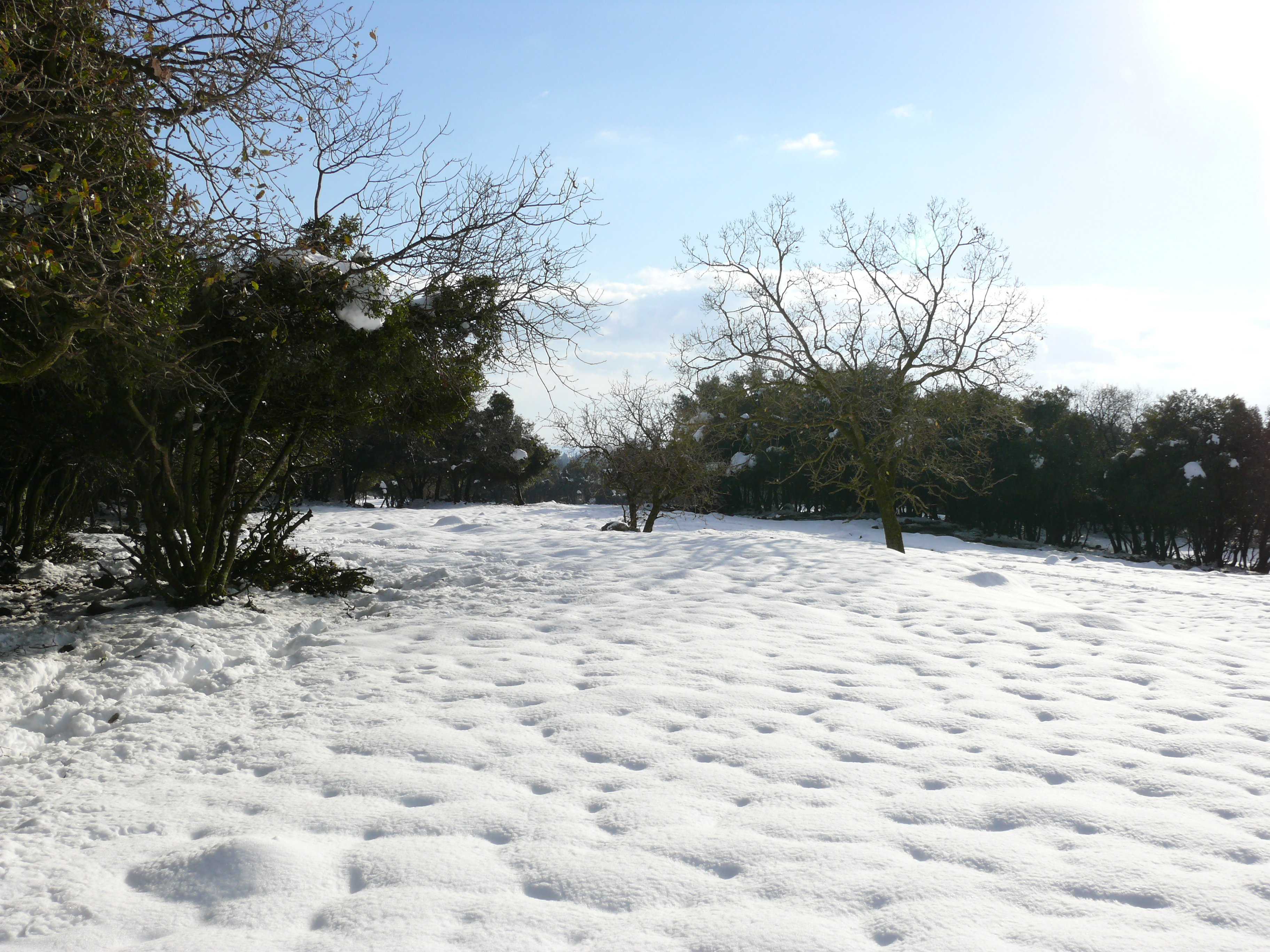 Snow in Odem forest, Ramat HaGolan, Golan Heights שלג ביער אודם ברמת הגולן, ישראל